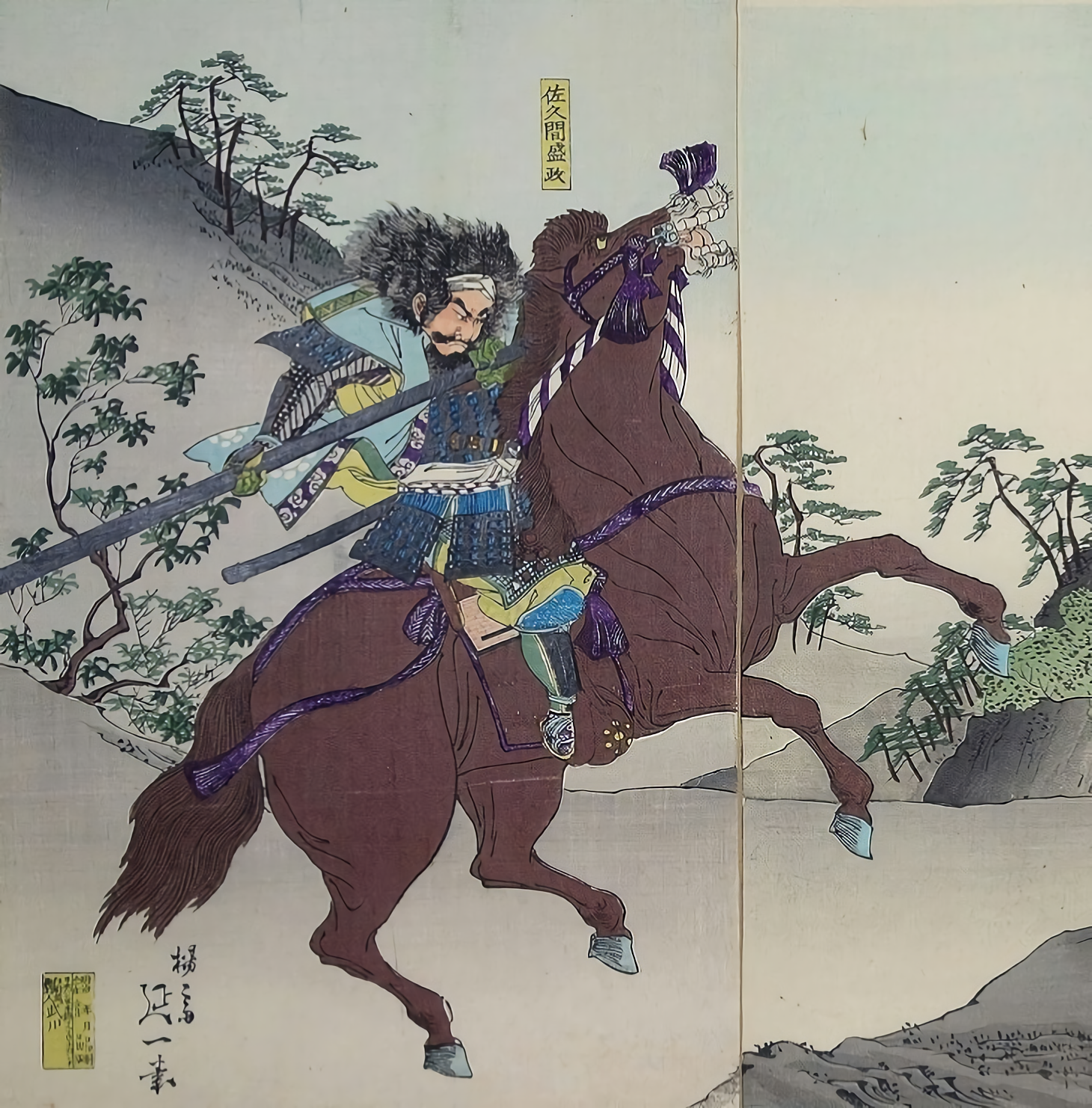 『佐久間盛政秀吉ヲ襲フ』 大判錦絵三枚続の一部